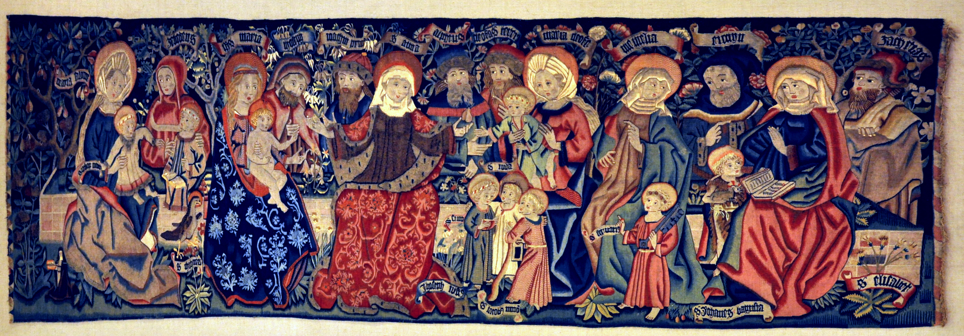 Antependium „Heilige Sippe“, Straßburg um 1490/1500, Wolle, Leinen, Seide, Gold- und Silberlahn; Museum für Angewandte Kunst Frankfurt am Main, Inv. Nr. 6811